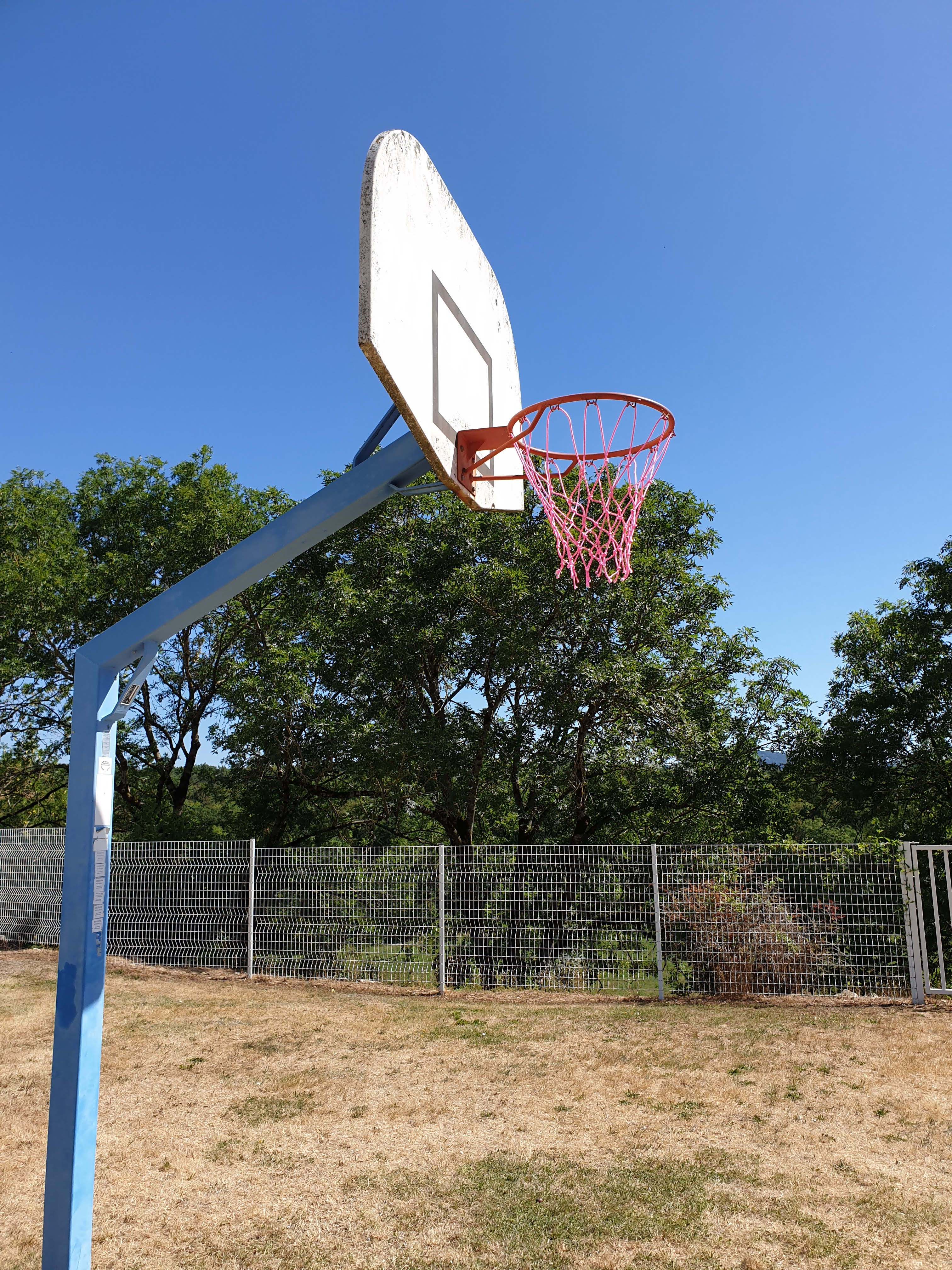 Des infrastructures internes